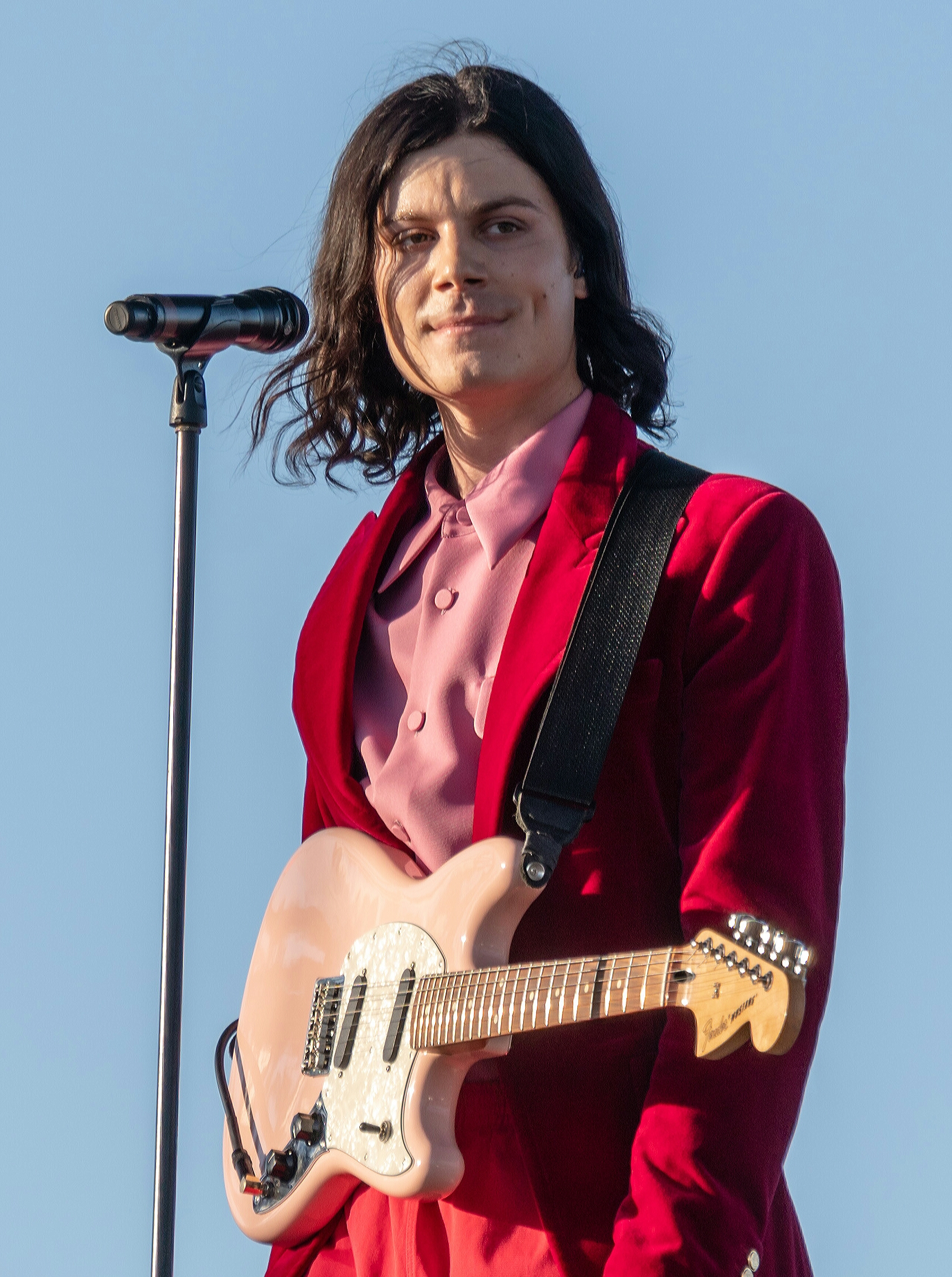 Coachella18W1-216